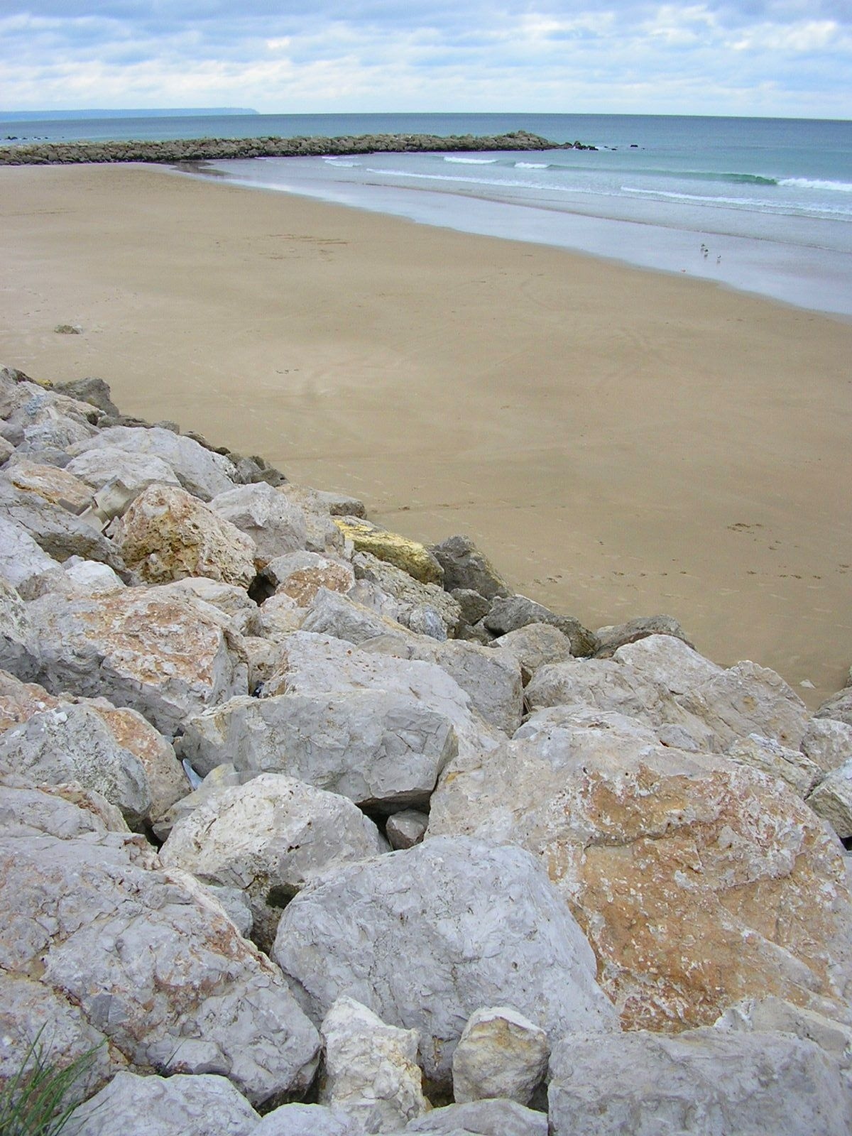 Autore: Massimo De Maria; Descrizione: Spiggia di Costa di Caparica: Licenza: CC 2.0